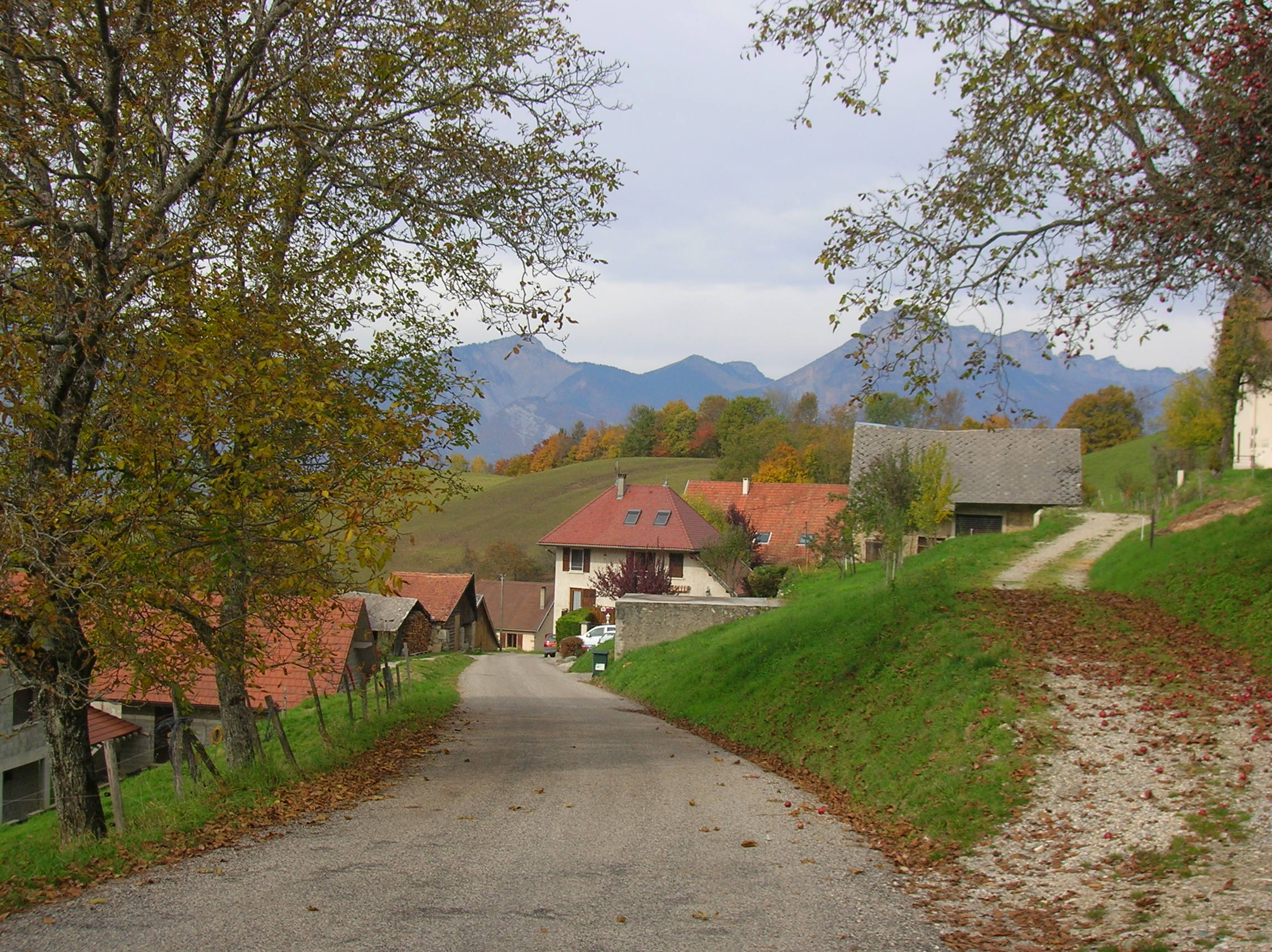 Saint-Jean-le-Vieux, Isère, France. Hameau Eglise